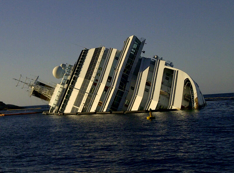 Costa Concordia, il naufragio